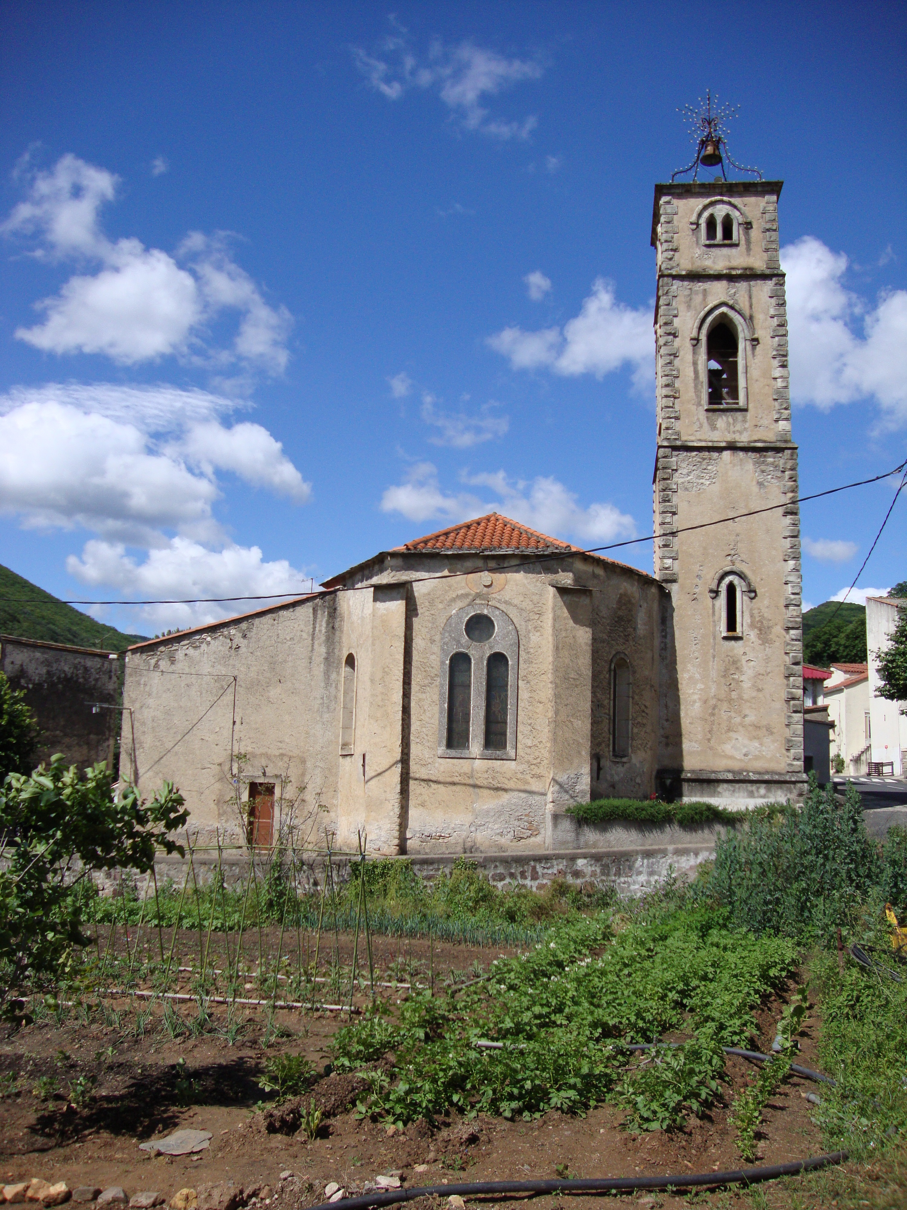 Saint-Étienne-Estréchoux (Hérault, Fr) - L'église Saint-Étienne